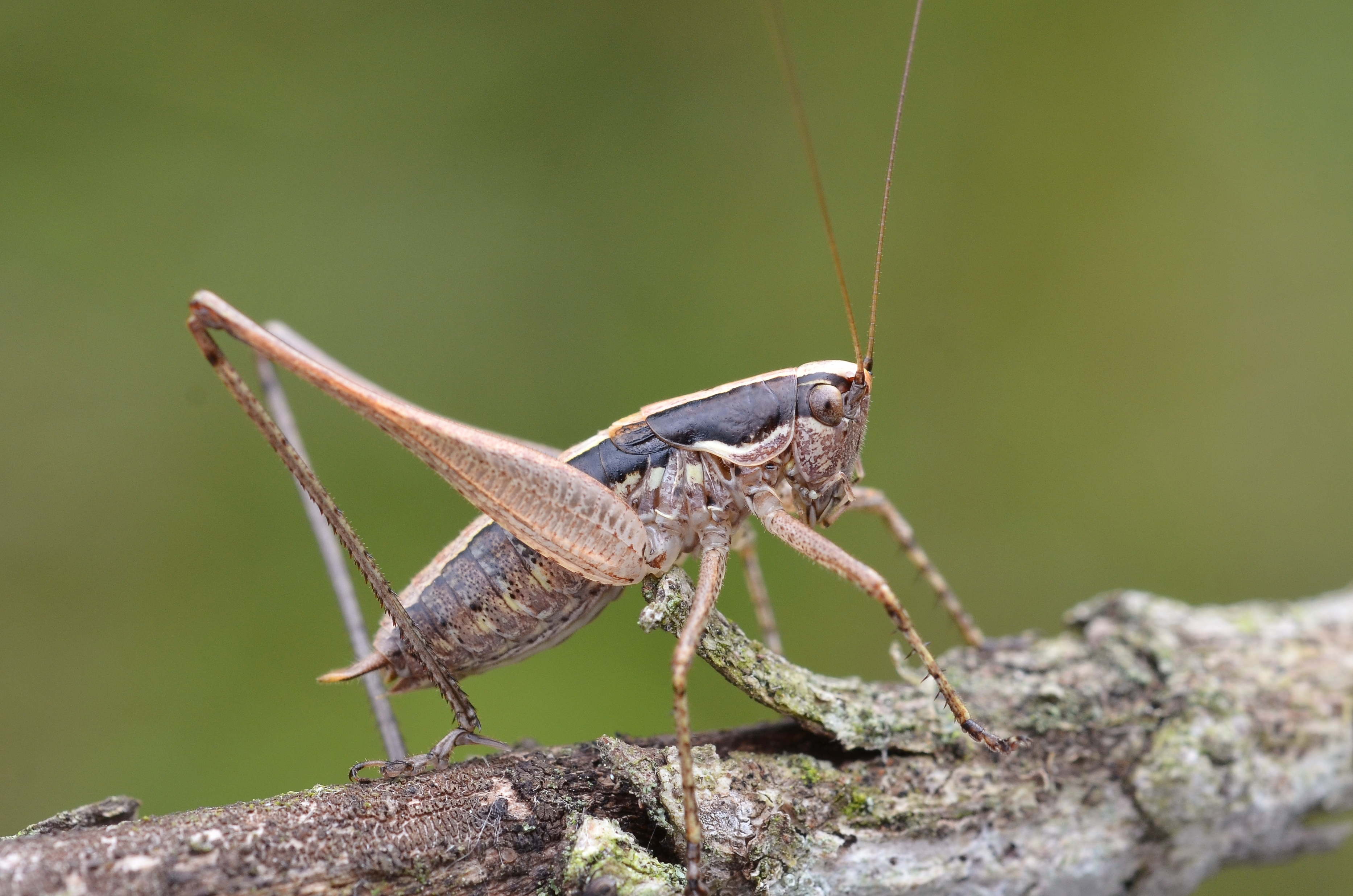 Yersinella raymondii male